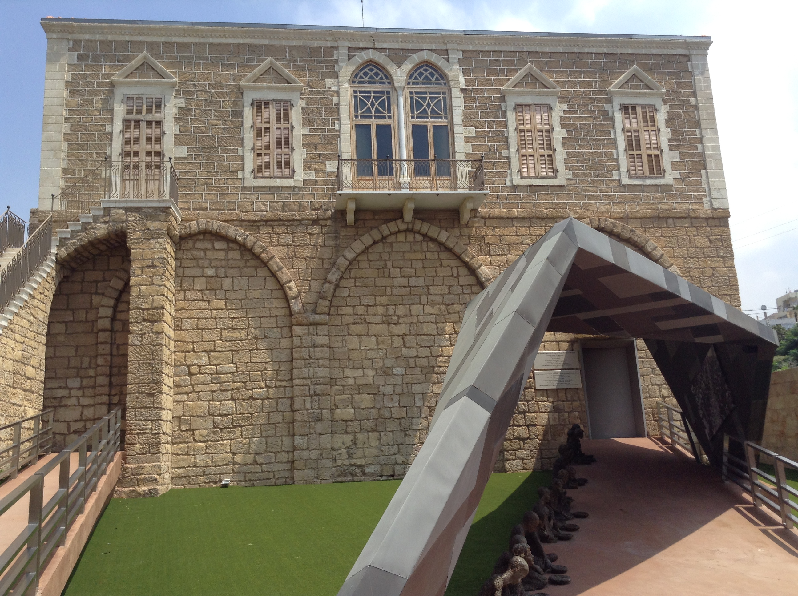 Թռչնոց բույնի թանգարանի շենքը